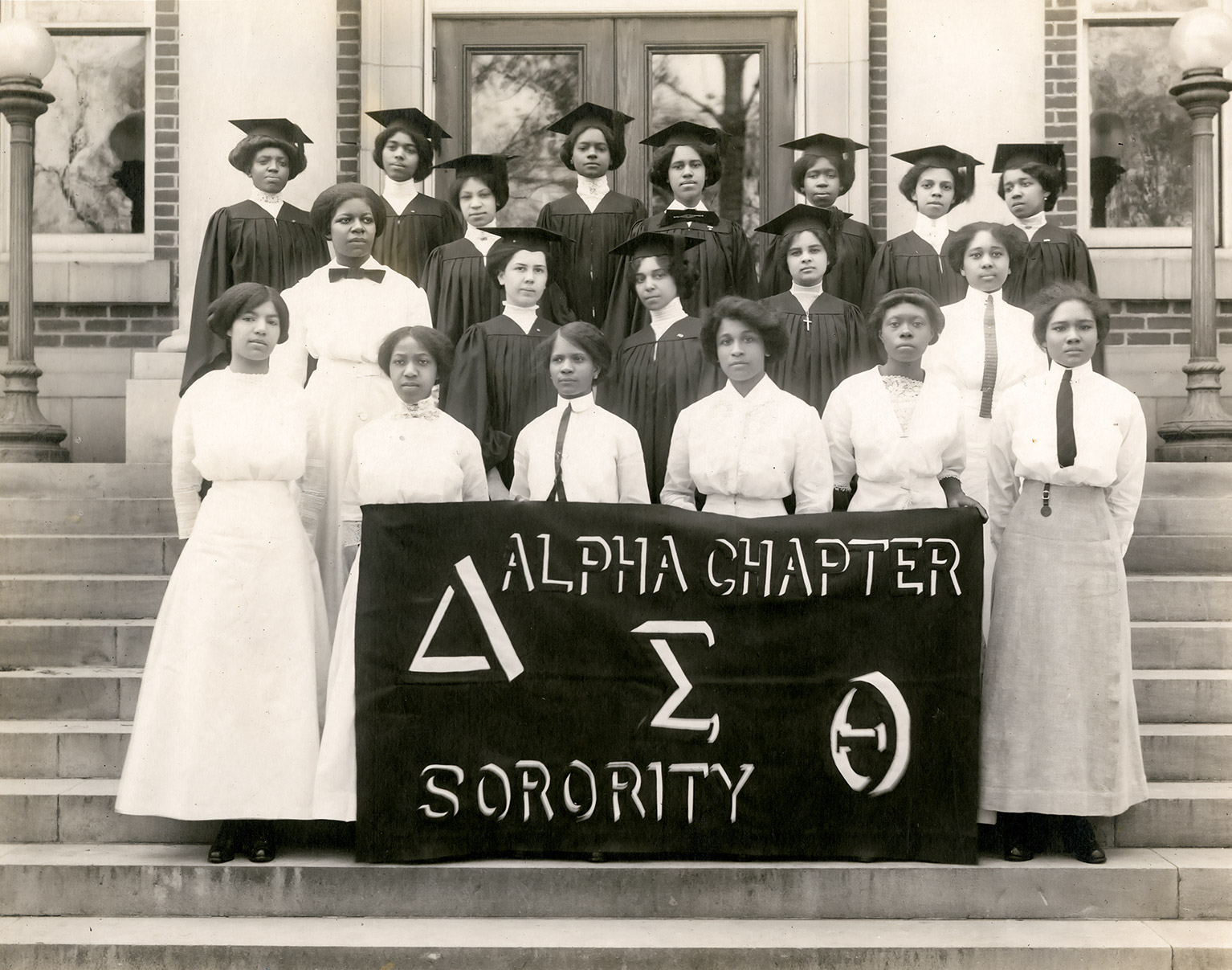 22 Founders of Delta Sigma Theta taken in 1913